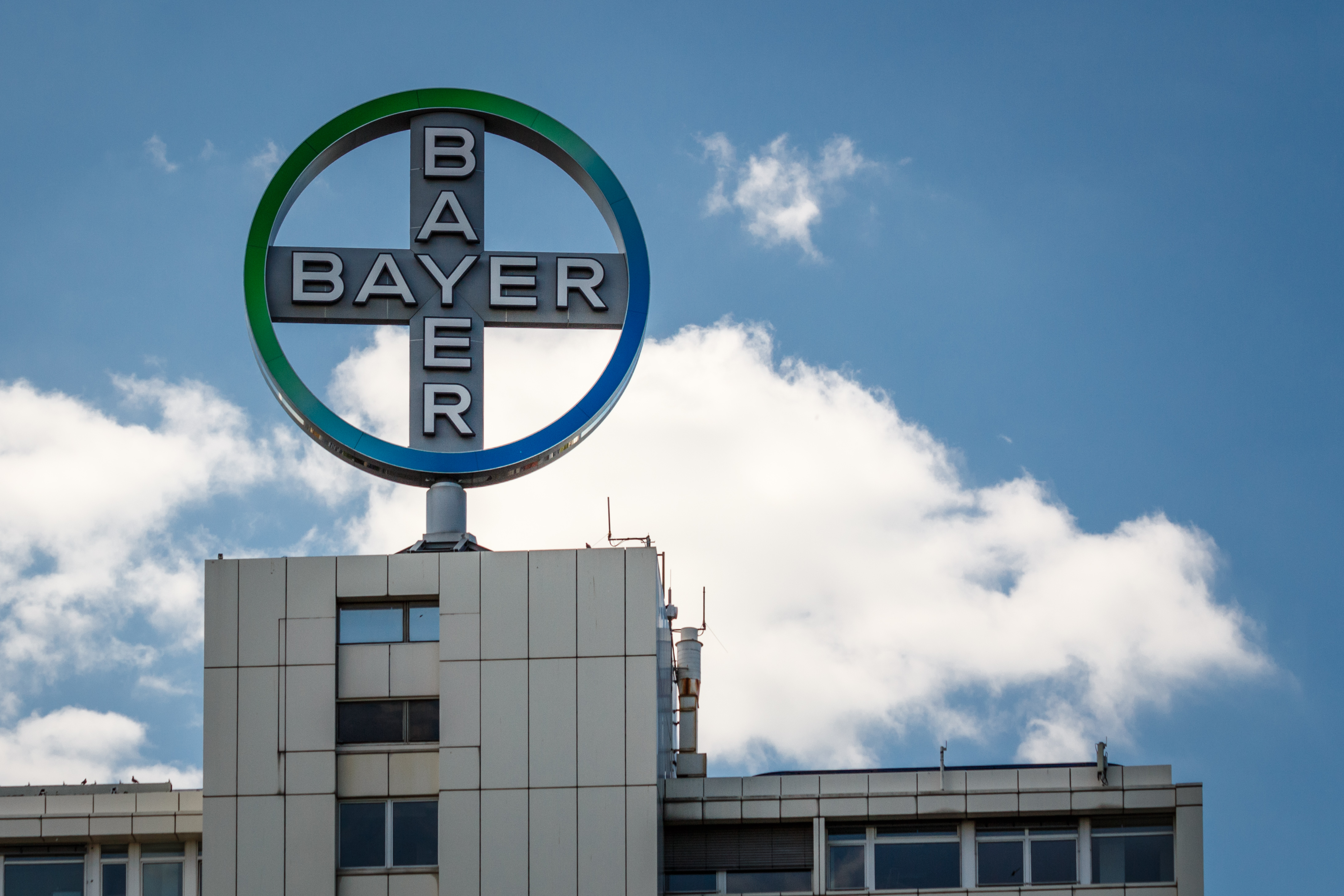 Bayer-Werbung auf dem DOB-Hochhaus